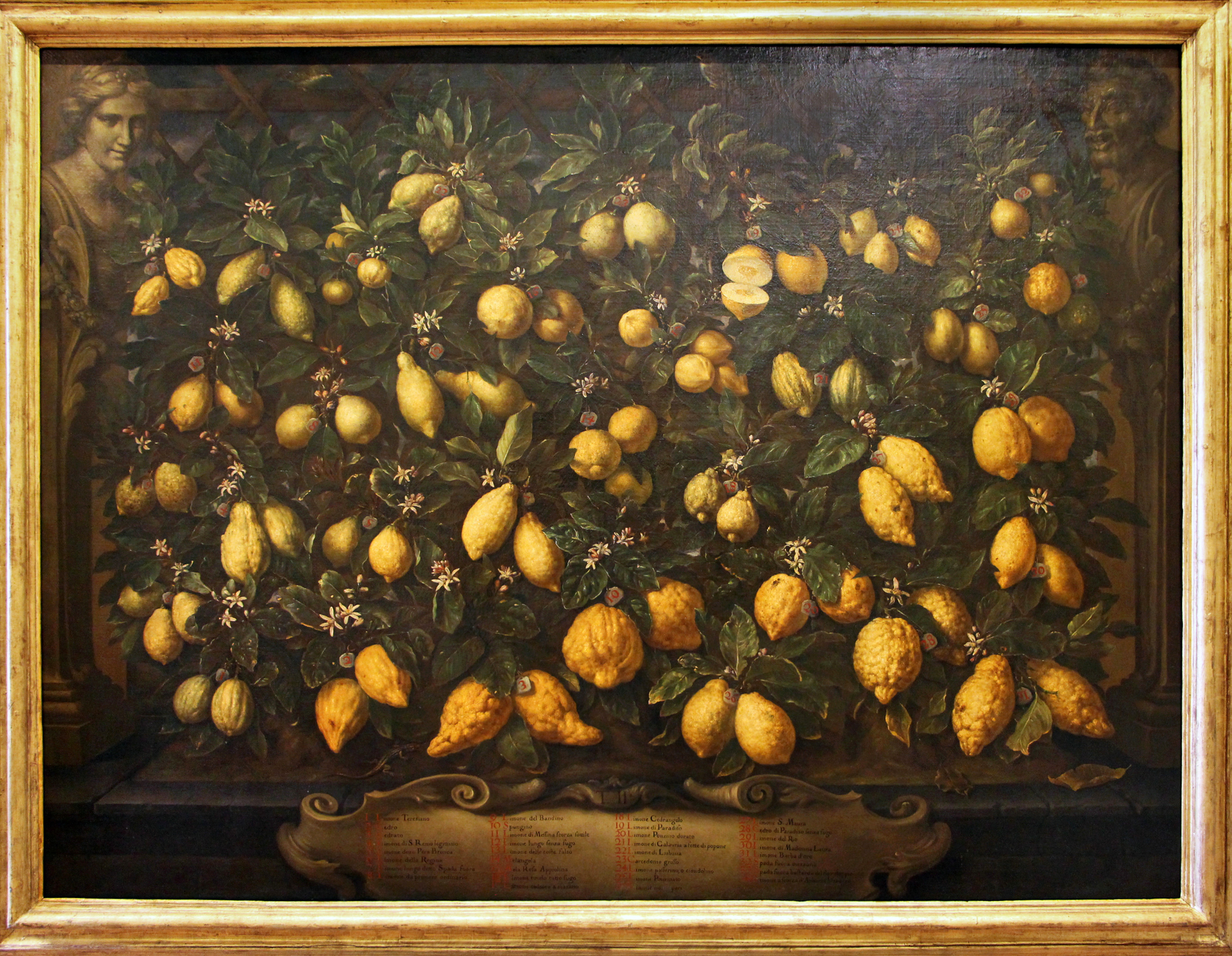 Villa medicea di Poggio a Caiano - MIBAC The making of this document was supported by Wikimedia CH. (Submit your project!) For all the files concerned, please see the category Supported by Wikimedia CH. This is a photo of a monument which is part of cultural heritage of Italy.